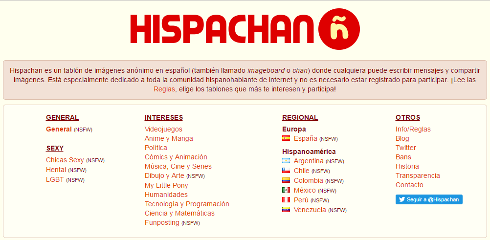 Hispachan, pagina de inicio.